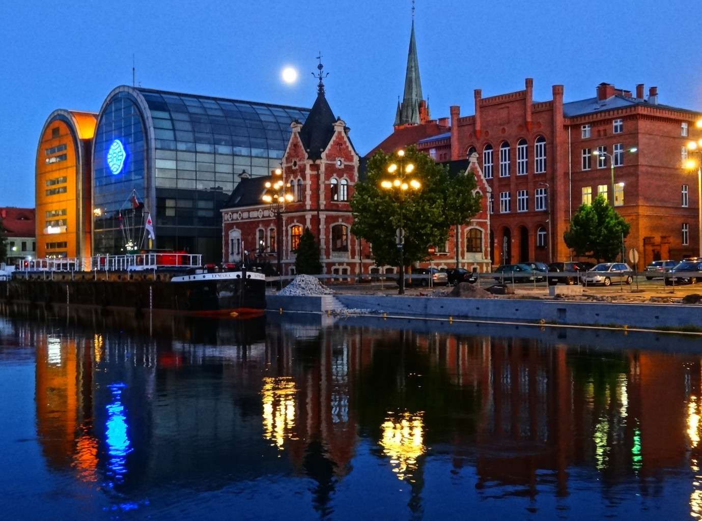 Południowe nabrzeże Brdy w centrum Bydgoszczy. Widoczne tzw. szklane spichrze i pałacyk Lloyda